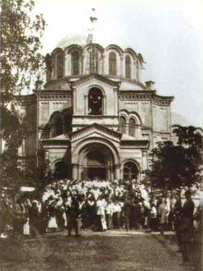 Мар'іна Горка, Падблонне. Царква Беларуская (тарашкевіца): Мар'іна Горка (Marjina Horka), Падблоньне (Padbłońnie). Царква